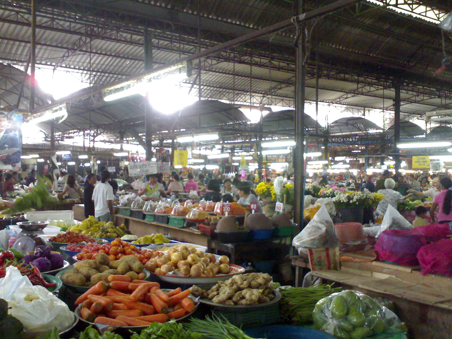 ตลาดสดท่าตะเภา ชุมพร